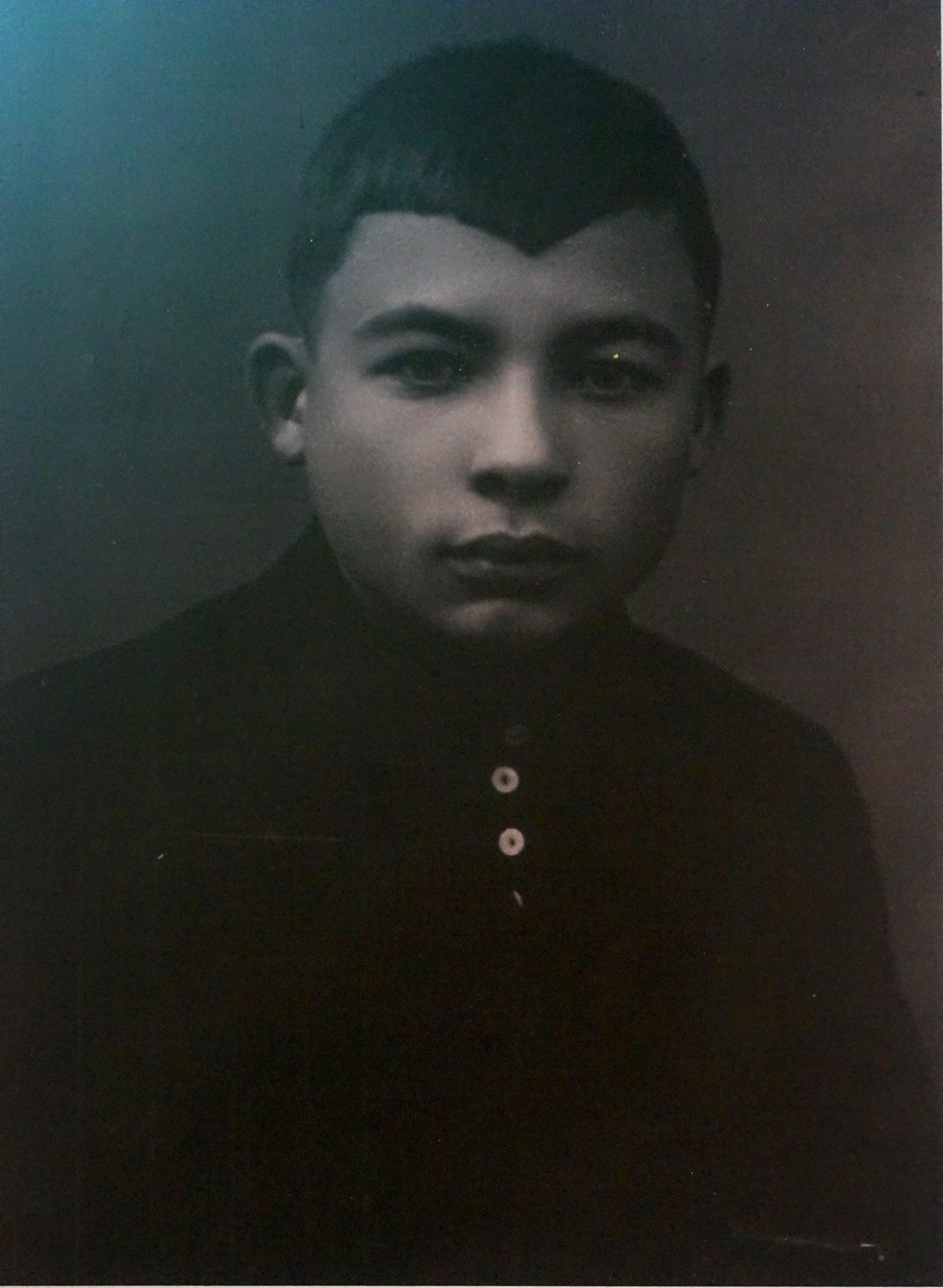 Виктор Кувшинов в день поступления в авиаклуб в Куйбышеве 29 ноября 1940